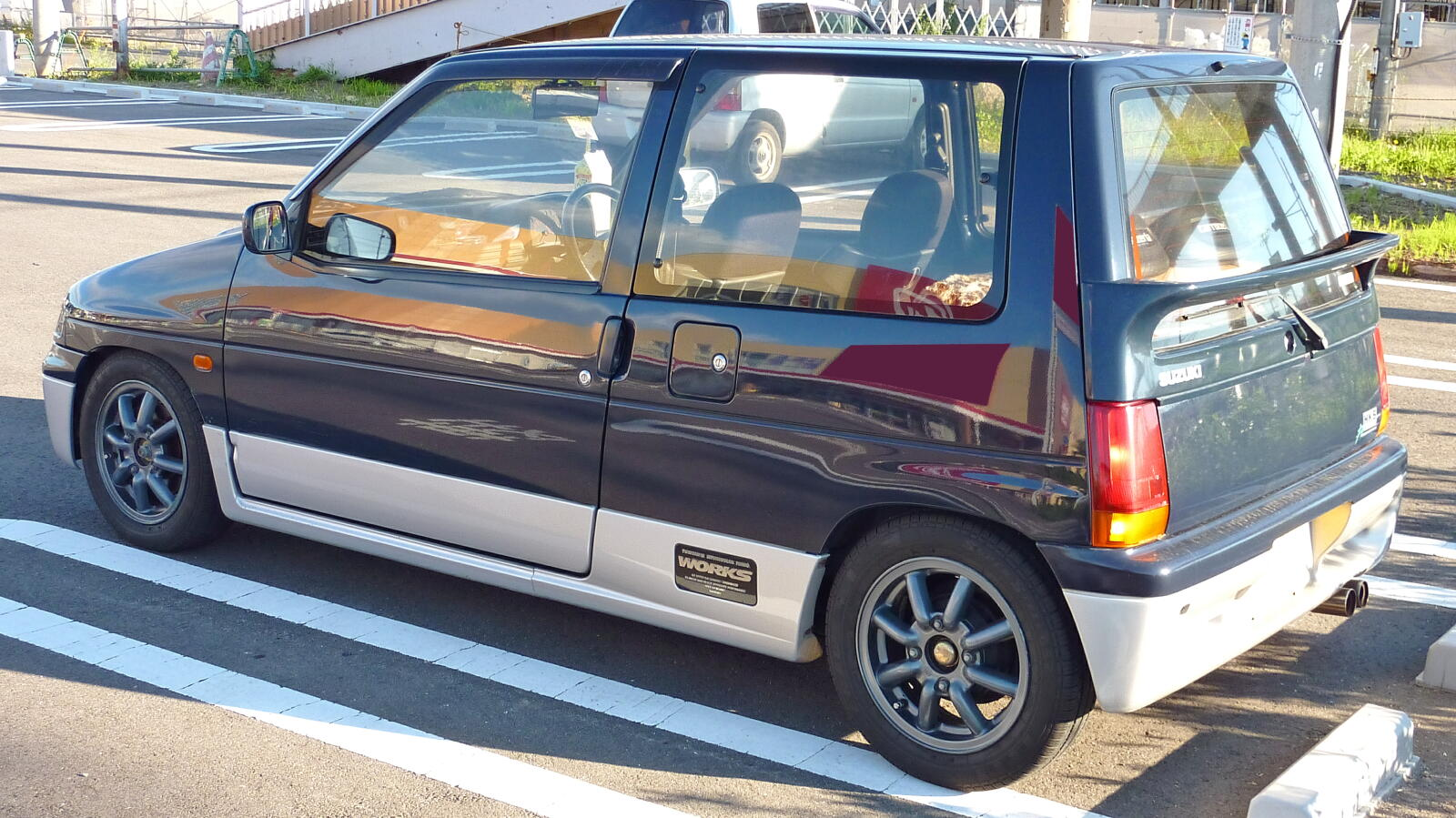 スズキ・アルトワークス（CA21S型・リア）